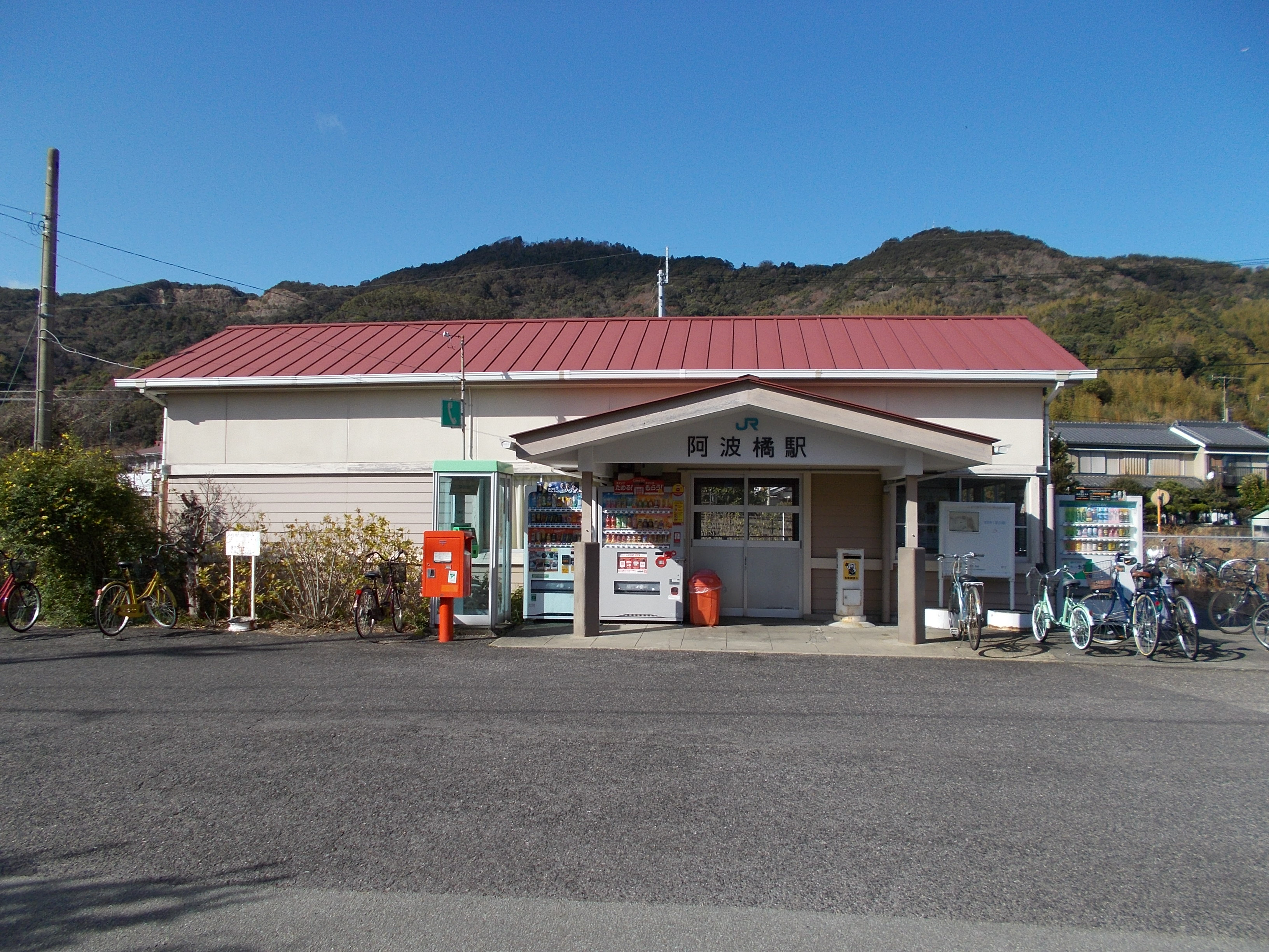 阿波橘駅 駅舎